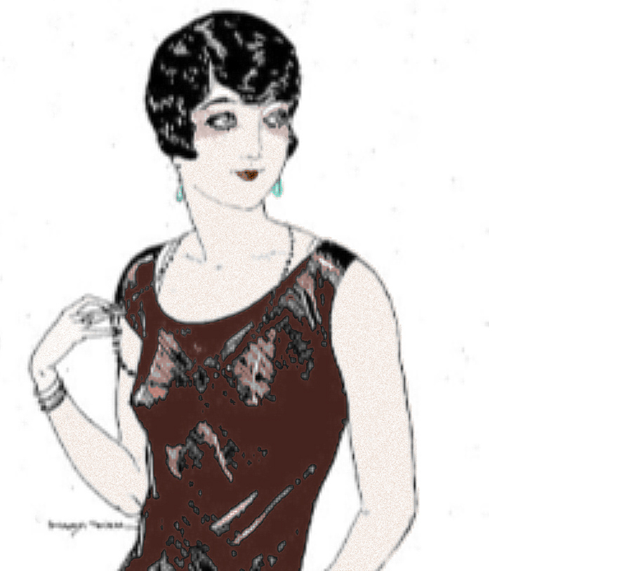 illustration de la nouvelle Galopin de Gaston Derys